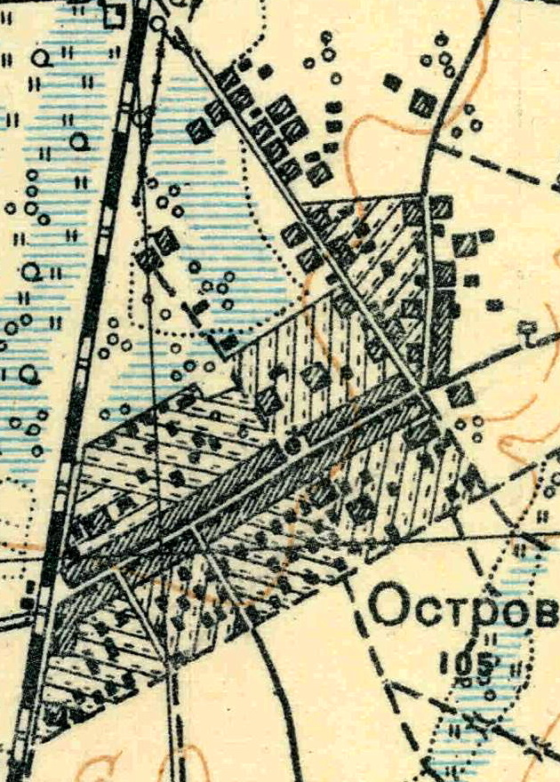 Топографическая карта Ленинградской области, квадрат О-36-25-А-а (Лампово), деревня Остров